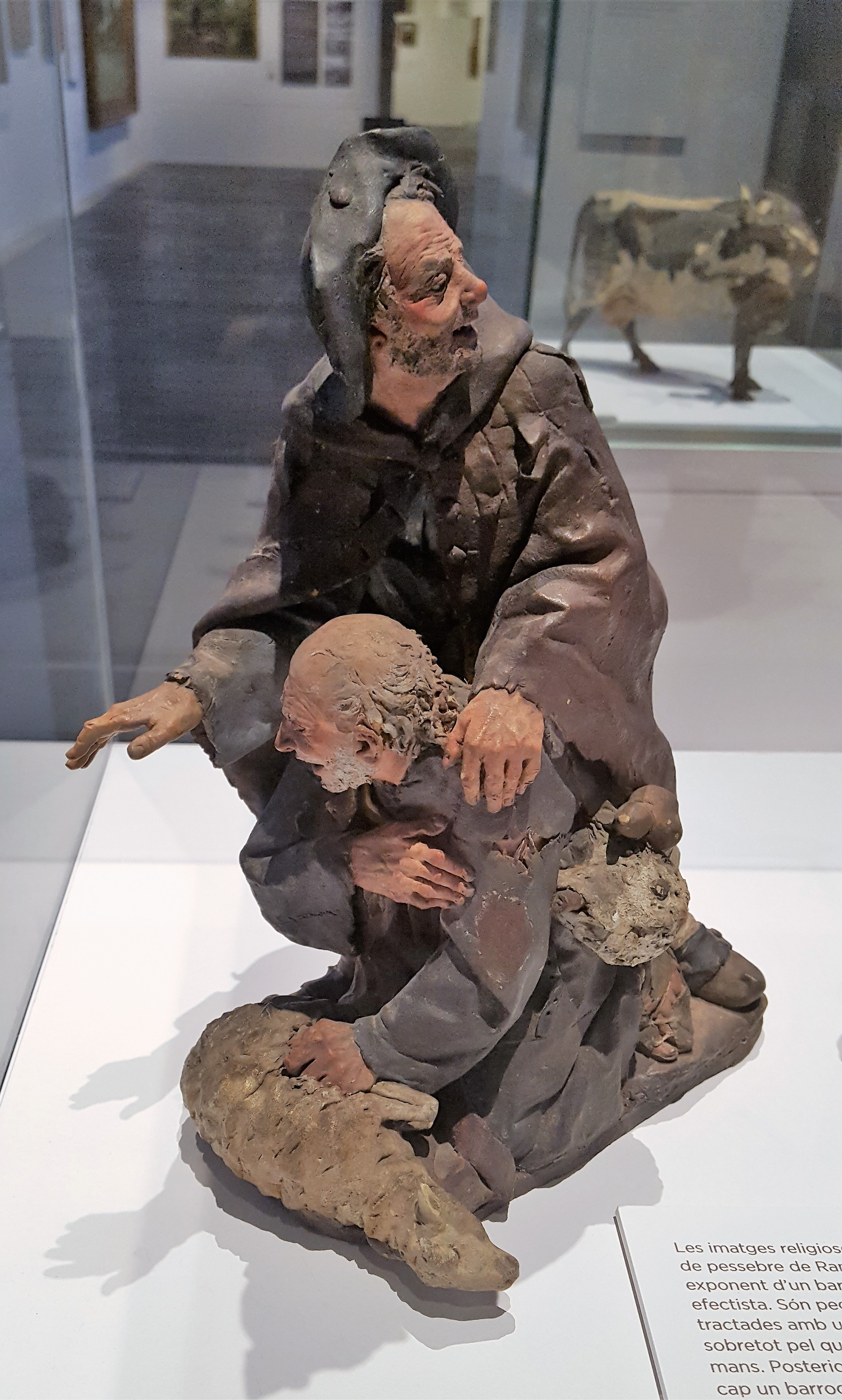 Ramon Amadeu: Hirten mit Schaf (Zwischen 1809 und 1821, Terrakotta, Museu Comarcal de la Garrotxa Olot)